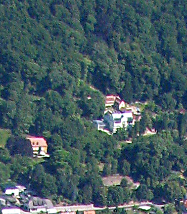 Ausschnitt aus Nur das Denkmalensemble Jägerberg